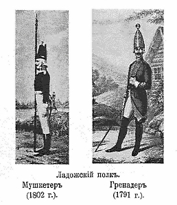 Ладожский 16-й пехотный полк. Мушкетёр (1802 год; полная версия) и Гренадер (1791 год; полная версия). Эта картинка была использована для иллюстрирования статьи «Ладожский, 16-й пехотный, полк» опубликованной в четырнадцатом томе «Военной энциклопедии», который был издан книгоиздательским товариществом И. Д. Сытина в 1914 году в столице Российской империи городе Санкт-Петербурге. Более подробное описание к этому рисунку можно прочесть в указанной выше статье на сайте Русской Викитеки.